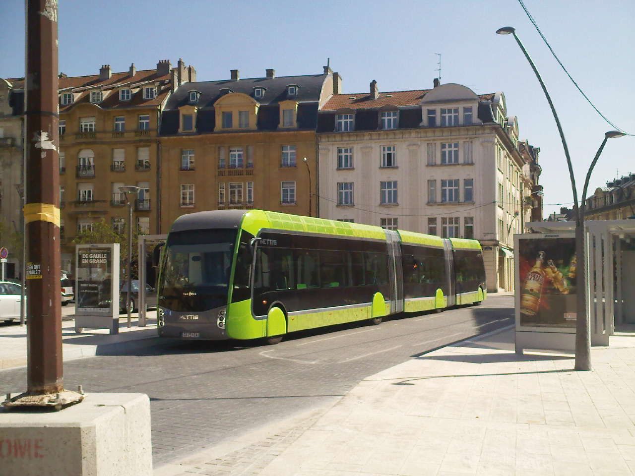 Photo du Mettis, BHNS de Metz